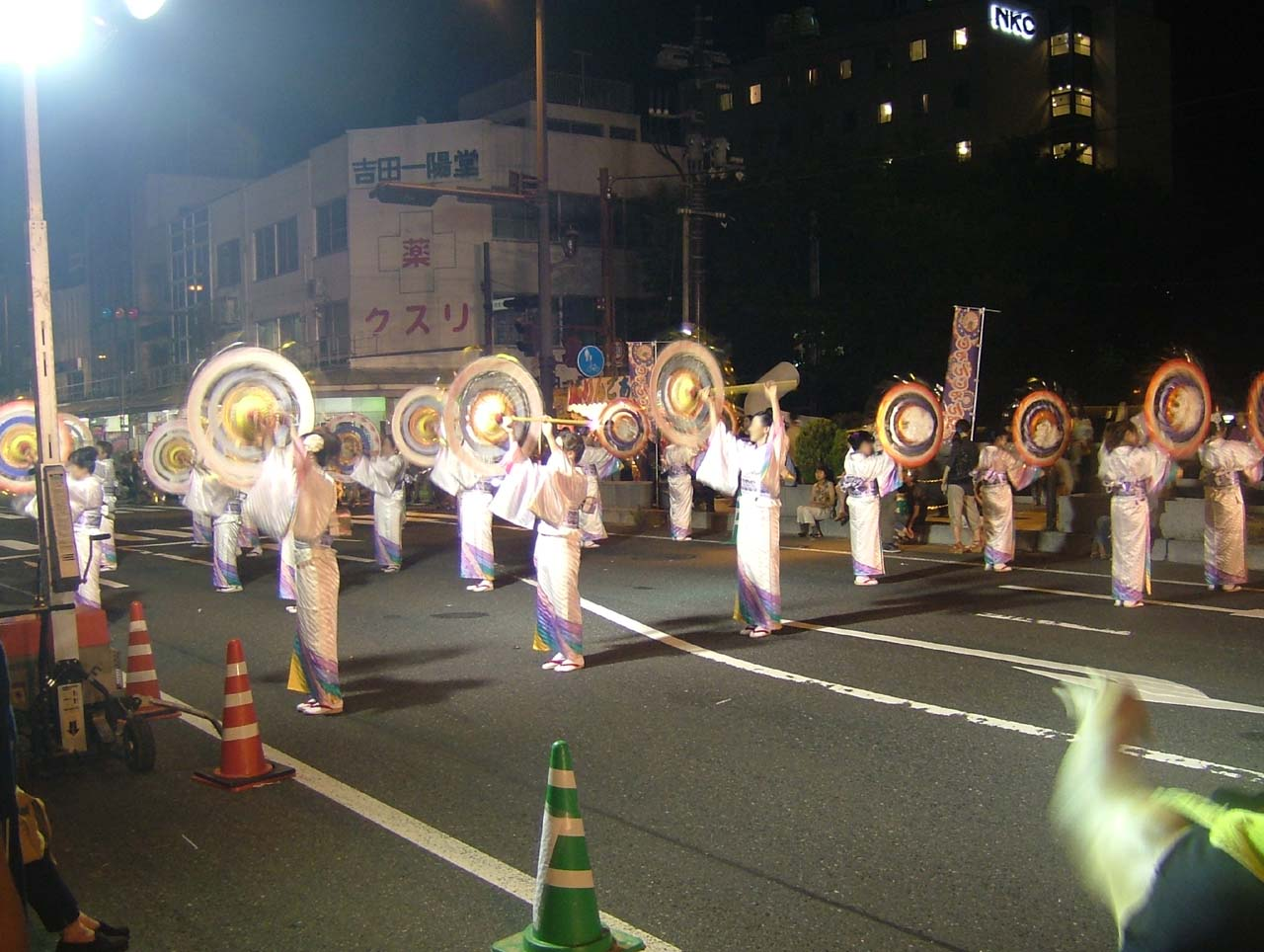 鳥取しゃんしゃん祭若桜橋